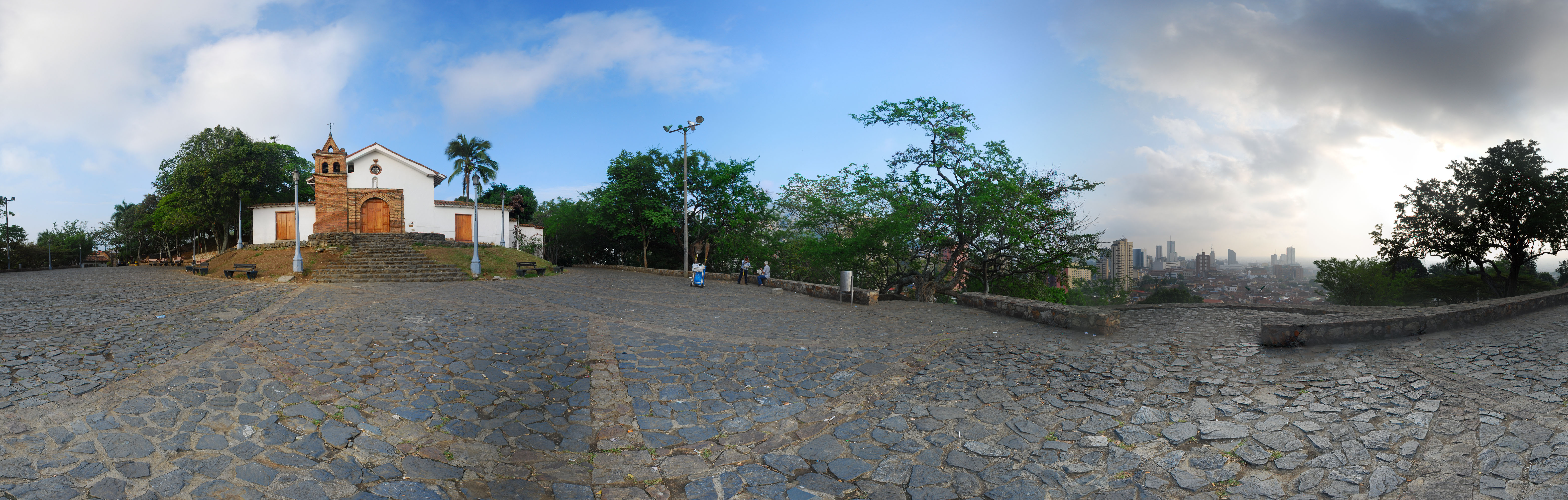 Panorámica de San Antonio en Cali.